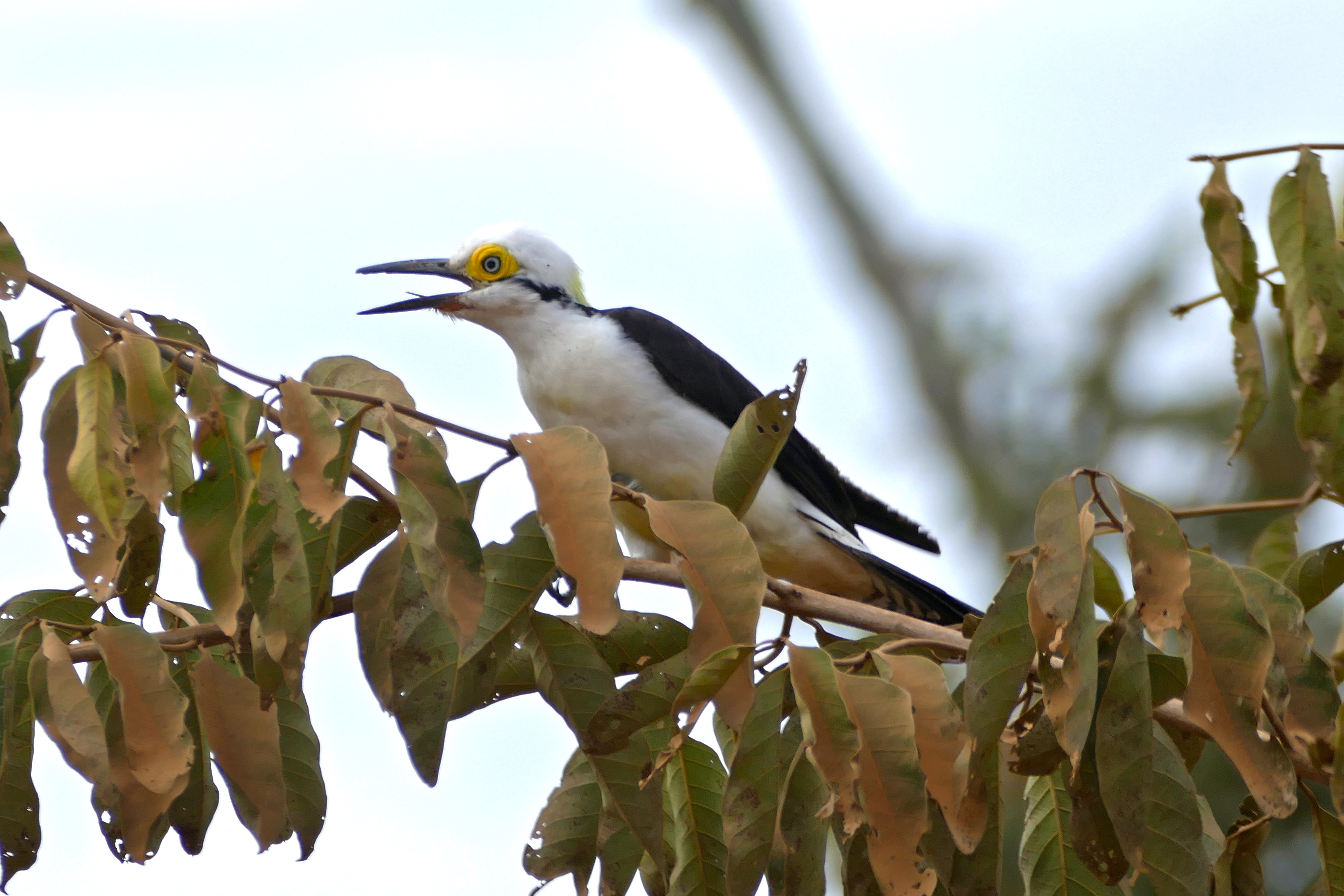 Transpantaneira, Poconé, Mato Grosso, BRAZIL